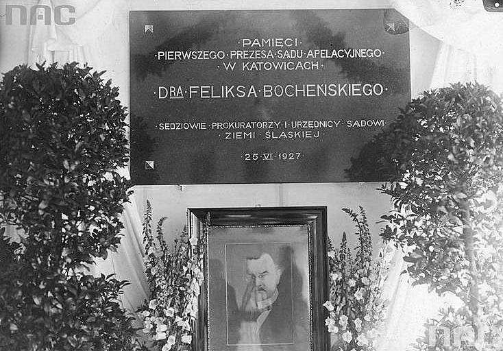 Tablica pamięci Feliksa Bocheńskiego w budynku Sądu Apelacyjnego w Katowicach w 1927.